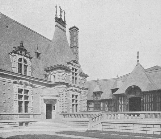 Cour de l'Hôtel de Pomar, construit dans un style néo-renaissance par l'architecte Pierre Victor Cuvillier, Avenue de Wagram Paris 17è (bâtiment détruit).